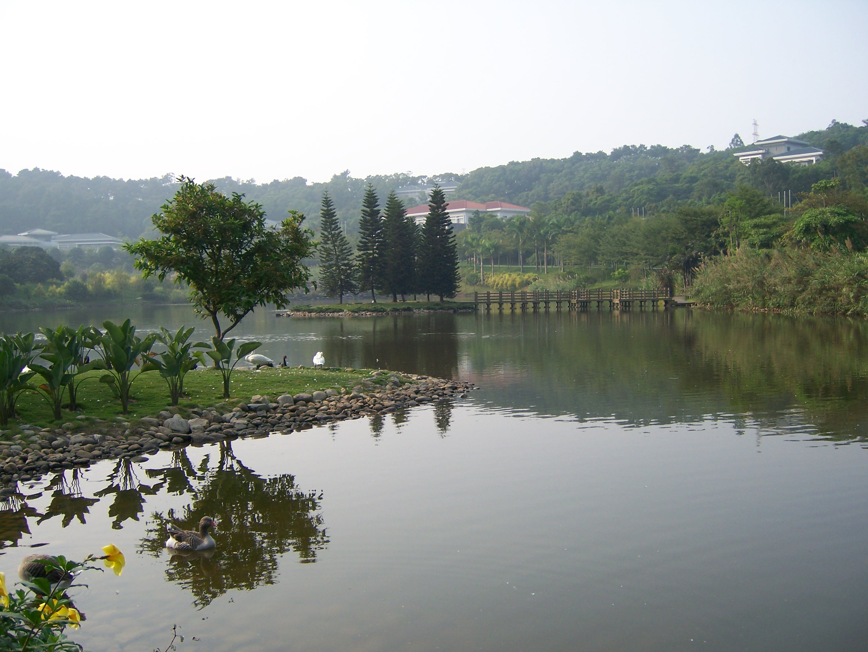 Xixiangtang, Nanning, Guangxi, China